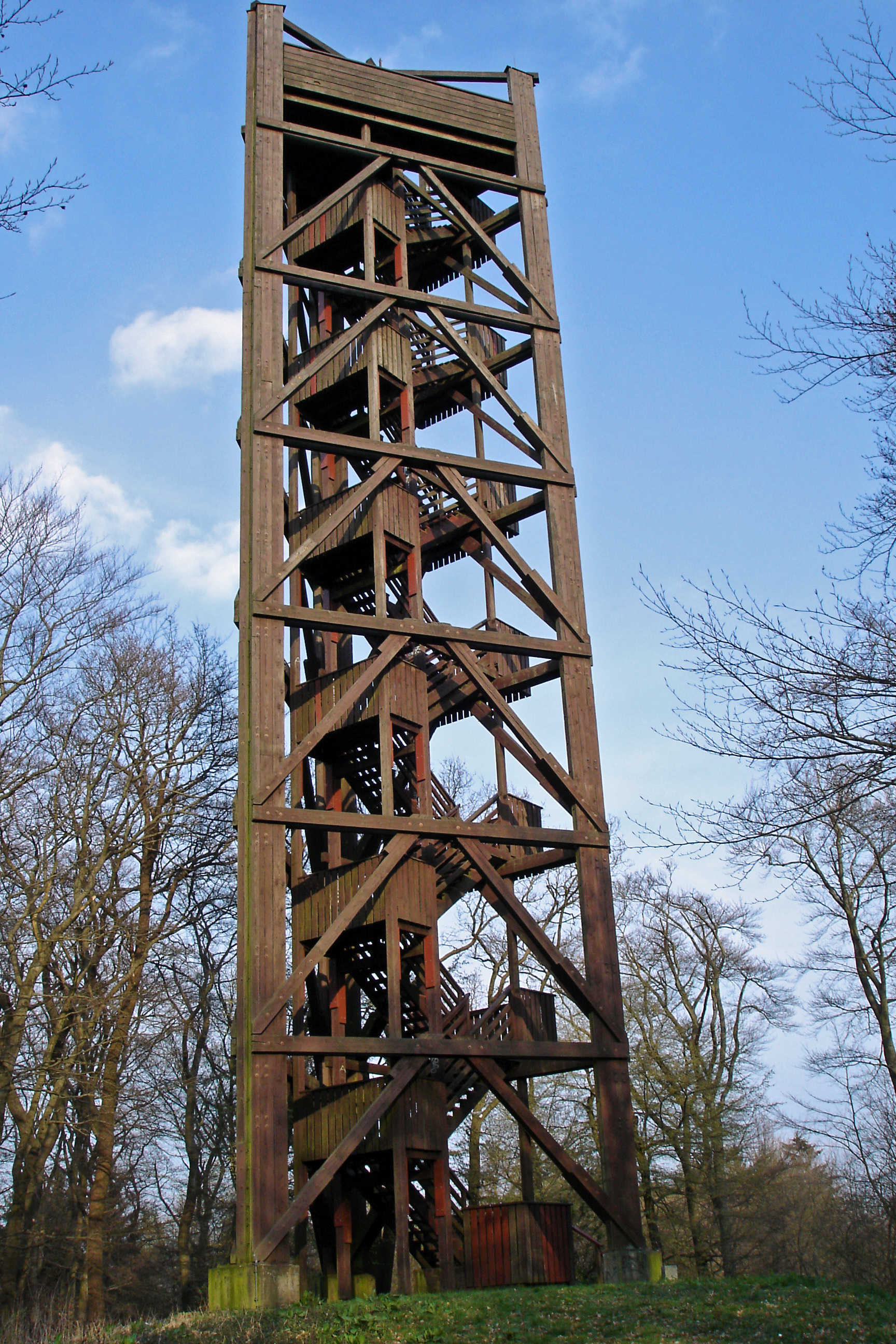 Atzelbergturm in Eppenhain